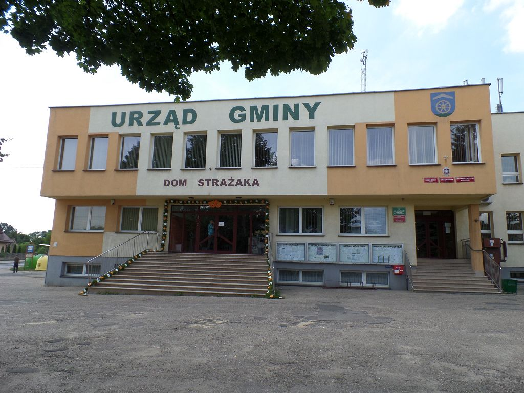 Urząd Gminy Ożarowice